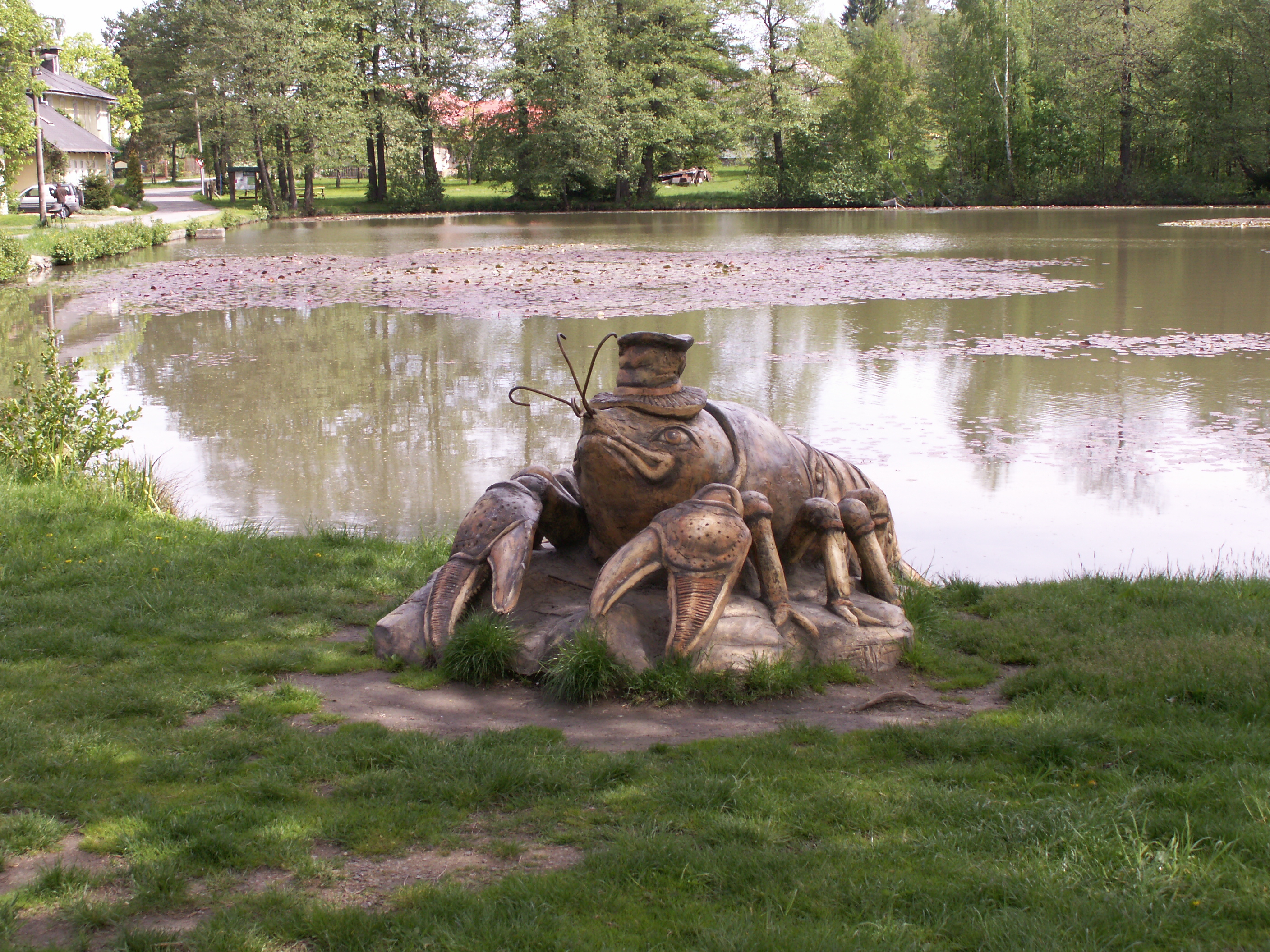 Račín, okres Žďár nad Sázavou, kraj Vysočina, socha raka (od Michala Olšiaka) u rybníka na návsi